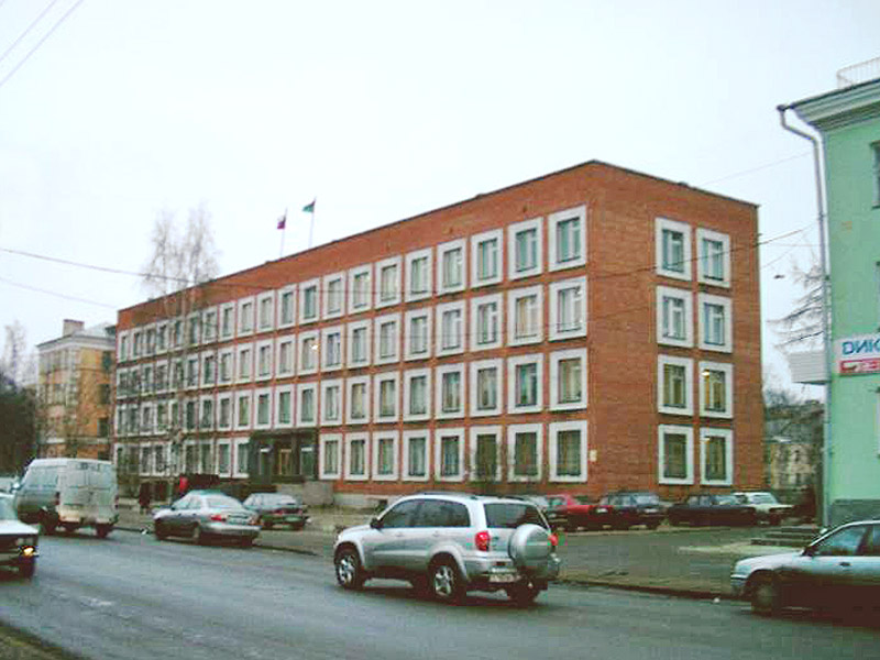 Здание администрации Прионежского района в г. Петрозаводске